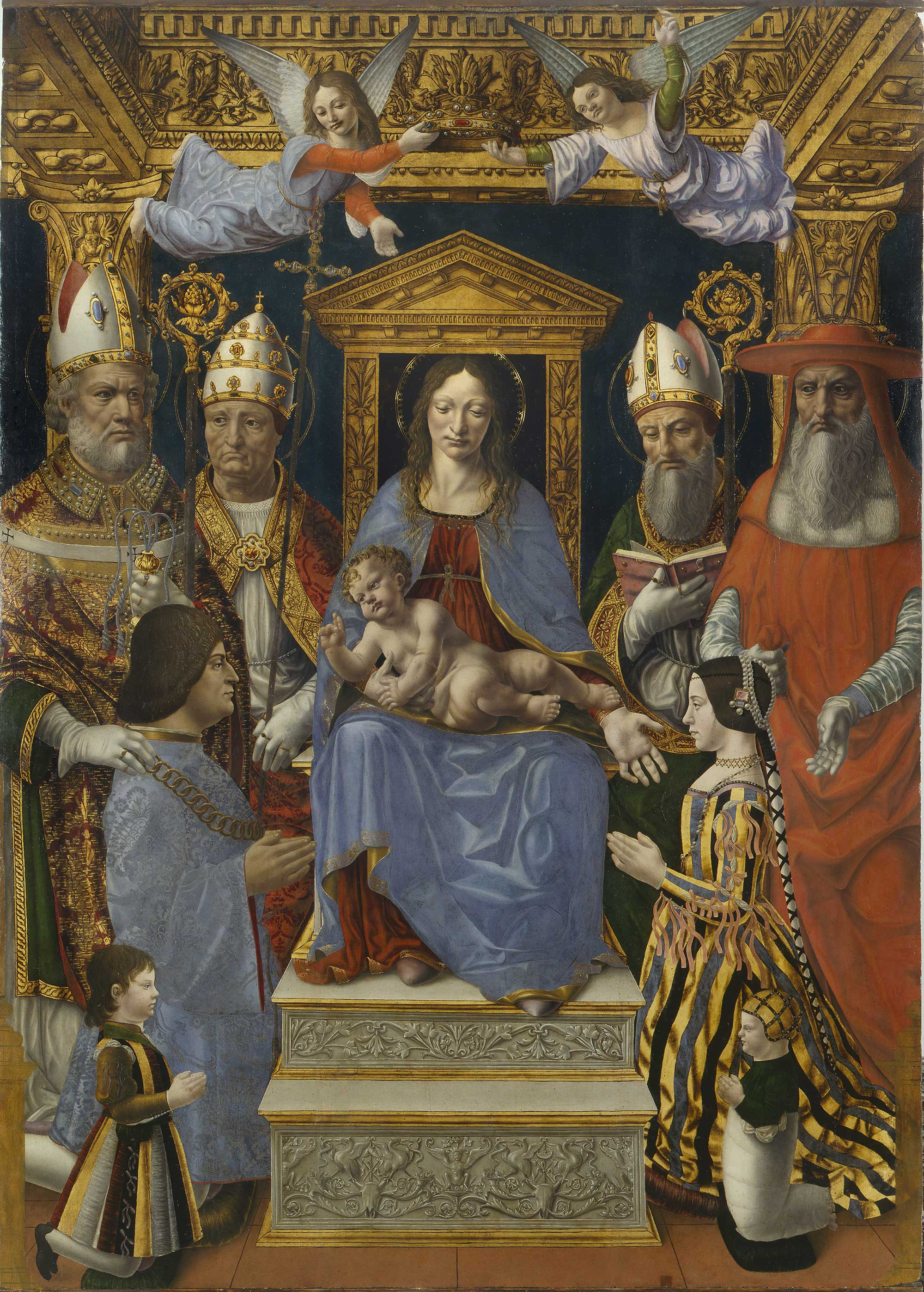 Sforza Altar: La Vergine col Figlio, quattro Dottori della Chiesa (San Girolamo, Sant'Agostino, Sant'Ambrogio e forse papa Leone Magno (?)) e ai loro piedi la famiglia di Ludovico il Moro (Beatrice d'Este, Massimiliano Sforza e Francesco II Sforza, ancora in fasce).